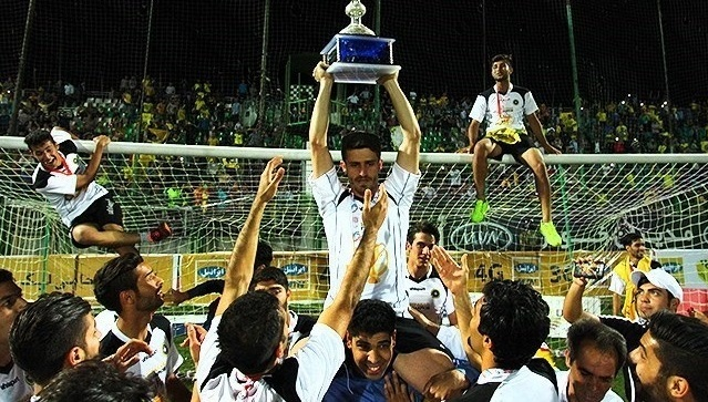 وریا غفوری در جشن قهرمانی سپاهان در پایان فصل ۱۵-۲۰۱۴ لیگ برتر